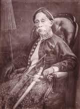 Pangeran Sugih Bupati Sumedang